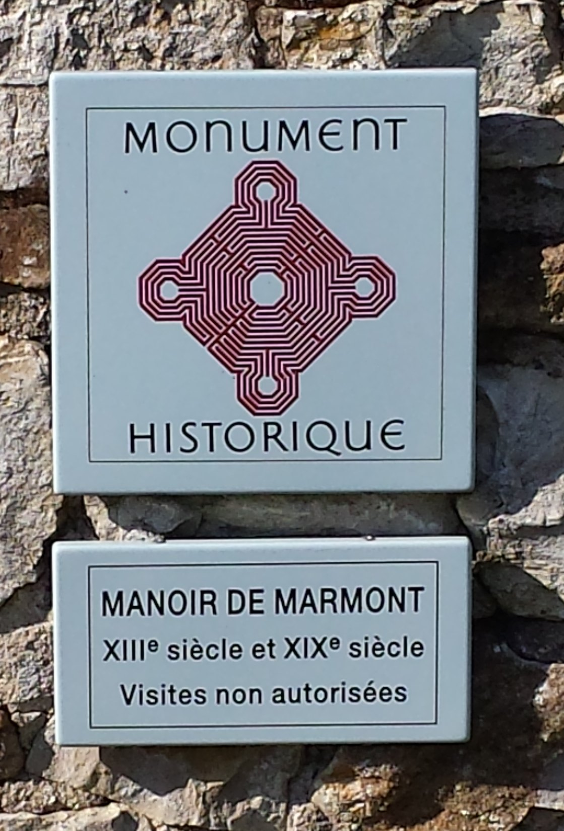 Plaque décrivant l'inscription aux Monuments Historiques du manoir de Marmont